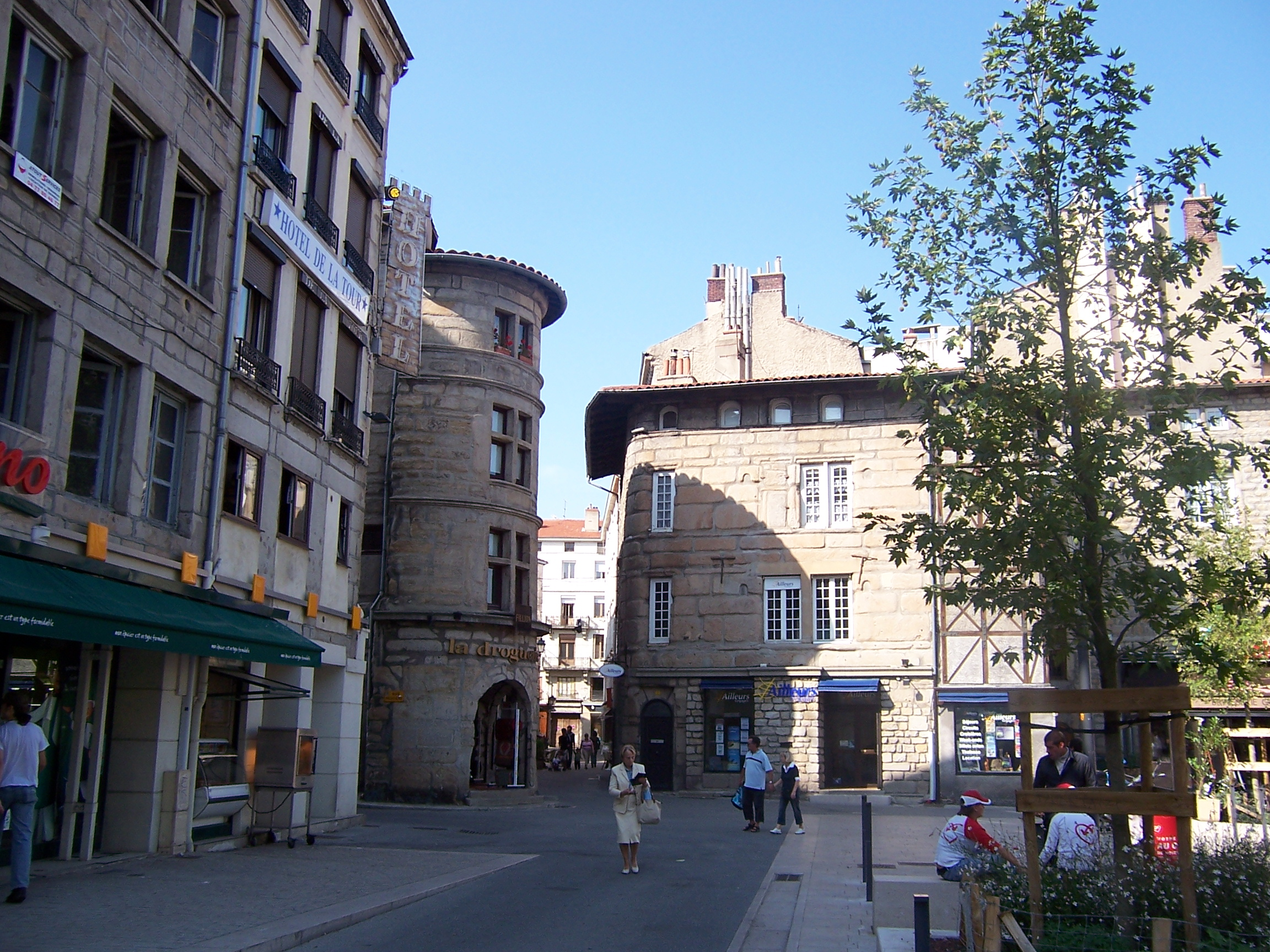 Tour de la Droguerie